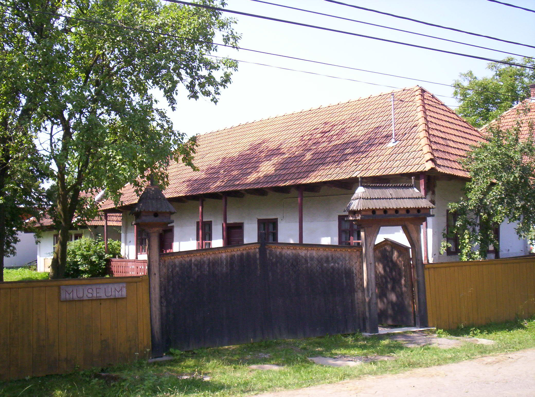 A Zabolai Tájház – photo taken by uploader User:Csanády in 2006.